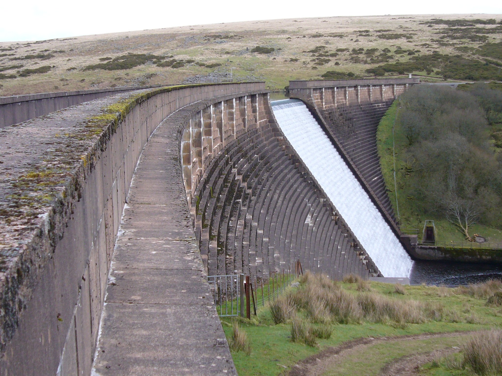 Avon dam on Dartmoor